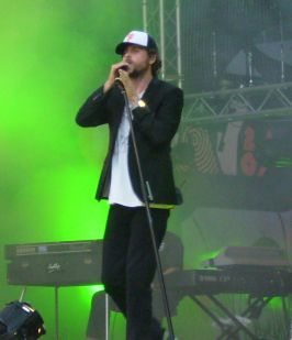 Jovanotti @ MTV Day 2007, Milan